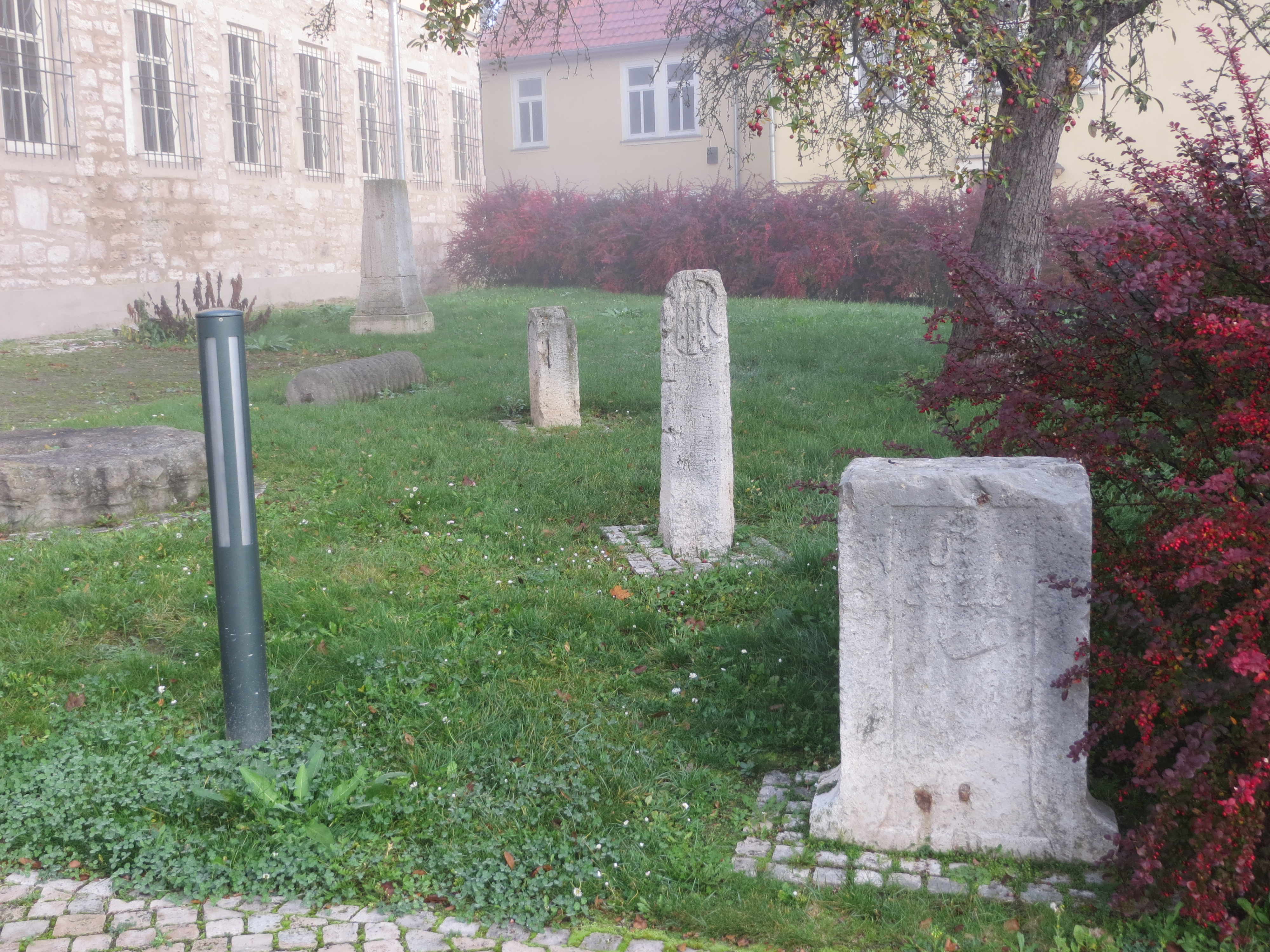 Die historischen Steine vor dem Stadtmuseum Bad Langensalza (v. l.) Waidmühlenstein aus der Gemeinde Grumbach. Dieser und ähnliche Steine dienten der Zerkleinerung der Waidpflanze. Saatandruckwalze. Diese wurde etwa bis 1920 in der Gemeinde Henningsleben benutzt und dabei von zwei bis drei Pferden gezogen. Rest der kursächsischen „Ganzmeilensäule No 64“ mit Posthorn, Jahreszahl 1729 und Reihennummer 64. Ursprünglicher Standort: Am Ortsausgang von Bad Langensalza Richtung Mühlhausen rechter Hand. Dieser Stein bildete die Grundlage für die Nachbildung der Ganzmeilensäule in der Marktstraße. Langensalzaer Grenzstein mit Stadtwappen und Wappen der Herren von Goldacker in Ufhoven, dem Widder. Ursprünglicher Standort: In der Nähe des Salzawehres und des Schwarzen Weges, heute vor dem Westtor. Langensalzaer Grenzstein. Dieser Stein trägt auf zwei von drei Seiten das Stadtwappen und die Jahreszahl 1747. Ursprünglicher Standort: An der Salza vor dem Klagetor, zwischen „Dörfchen“ und Gasanstalt. Hier befinden sich heute die Buswendeschleife und der Eingangsbereich zum Rosengarten. Kursächsischer Viertelmeilenstein No 63 mit Posthorn und Jahreszahl 1729. Ursprünglicher Standort: An der Tennstedter Straße, in der Nähe der Gabelung zur Felsenkellerstraße.